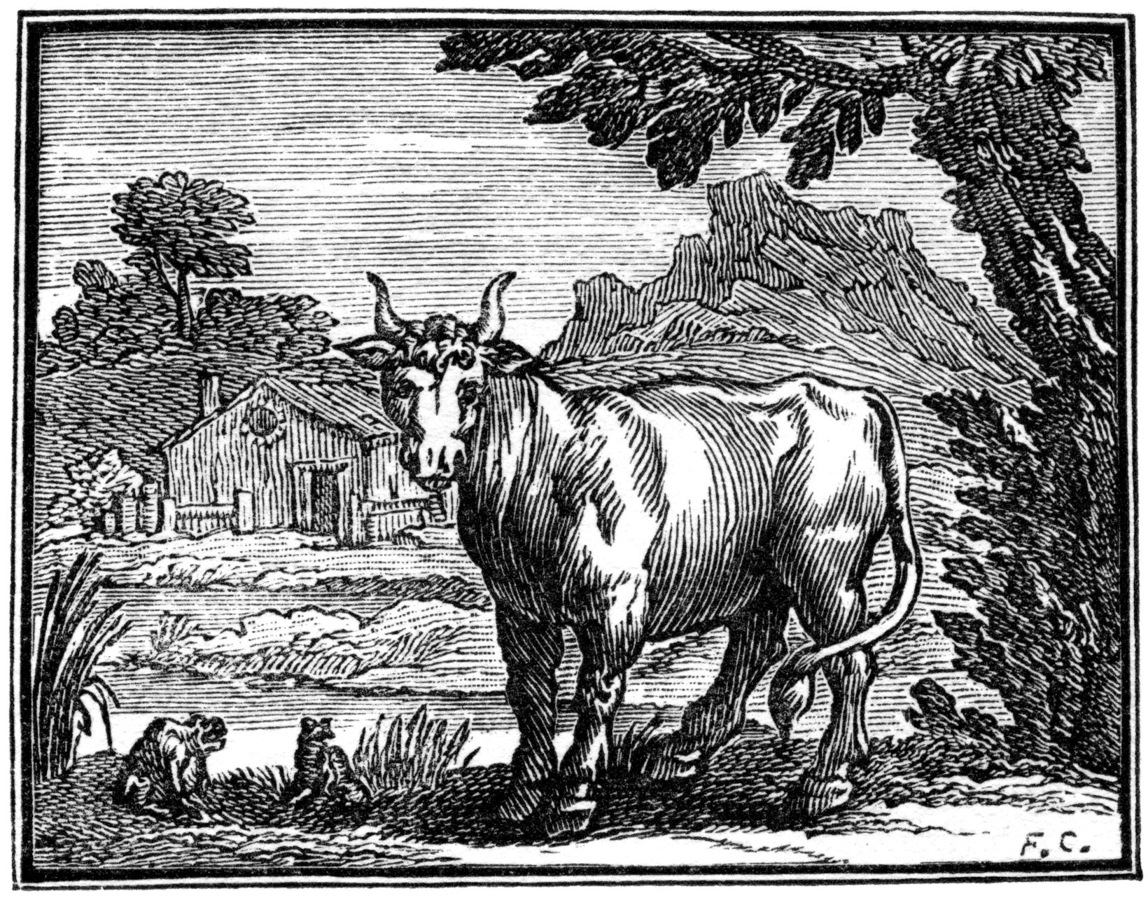 Illustrations pour les « Fables choisies mises en vers par M. de la Fontaine », Claude Barbin et Denys Thierry, Paris, 1668 (premier recueil) 1678-79 (deuxième recueil) 1694 (troisième recueil). Numérotation Charpentier (1705).